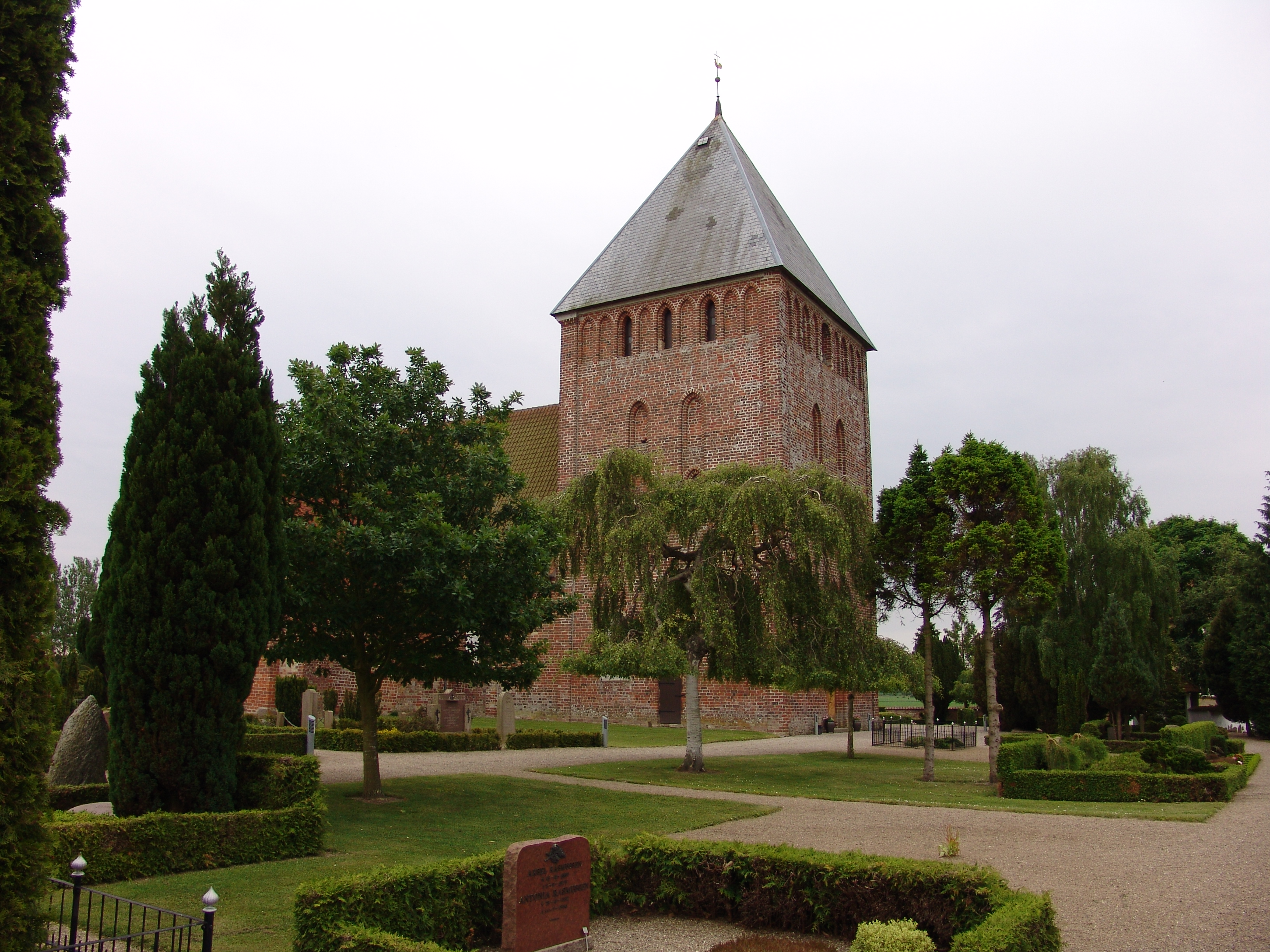 Østofte Kirke